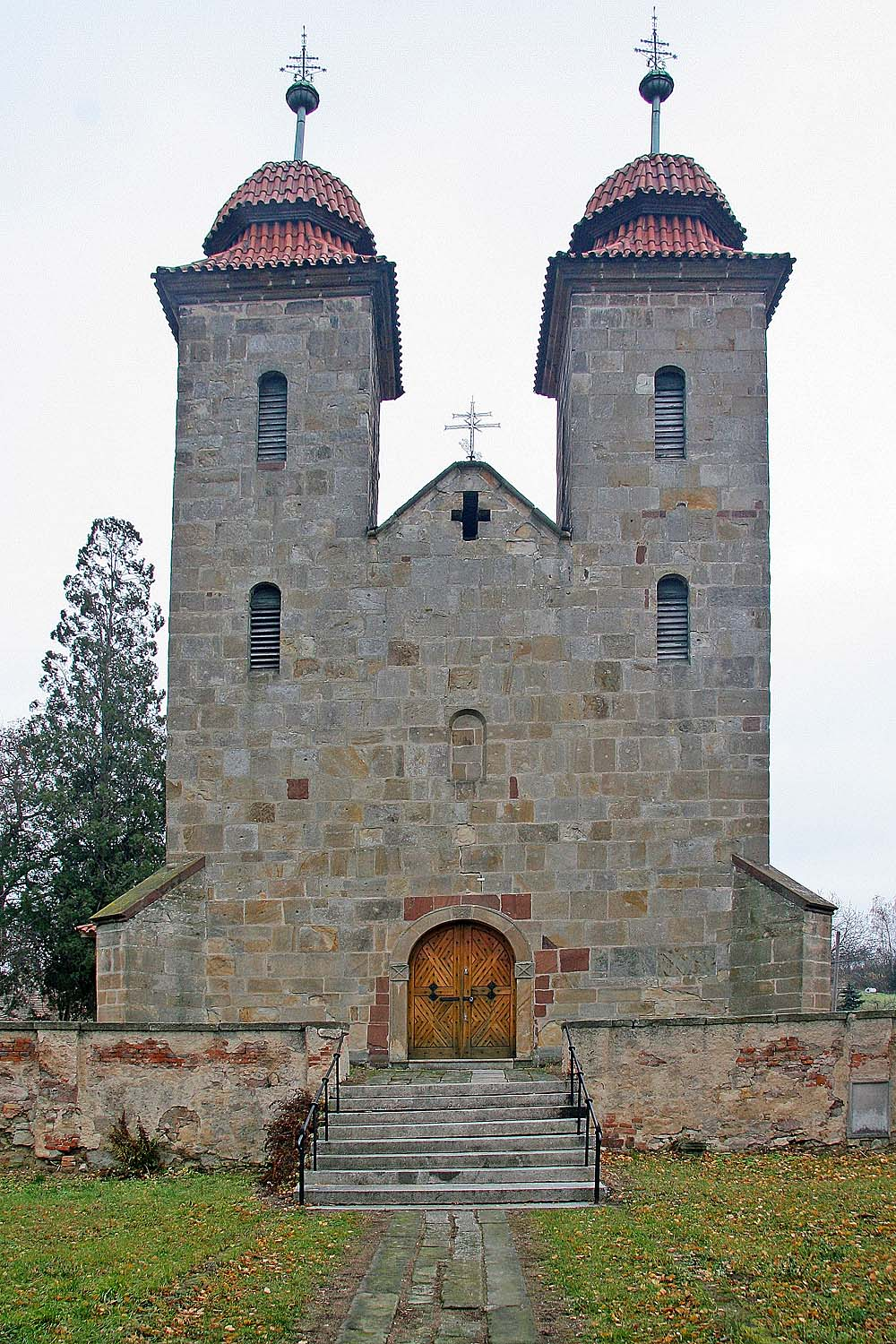 Průčelí románské baziliky Nanebevzetí Panny Marie v Tismicích autor: Prazak date: 17. 11. 2006